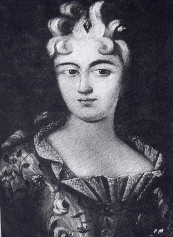 Virreina del Rio de la Plata